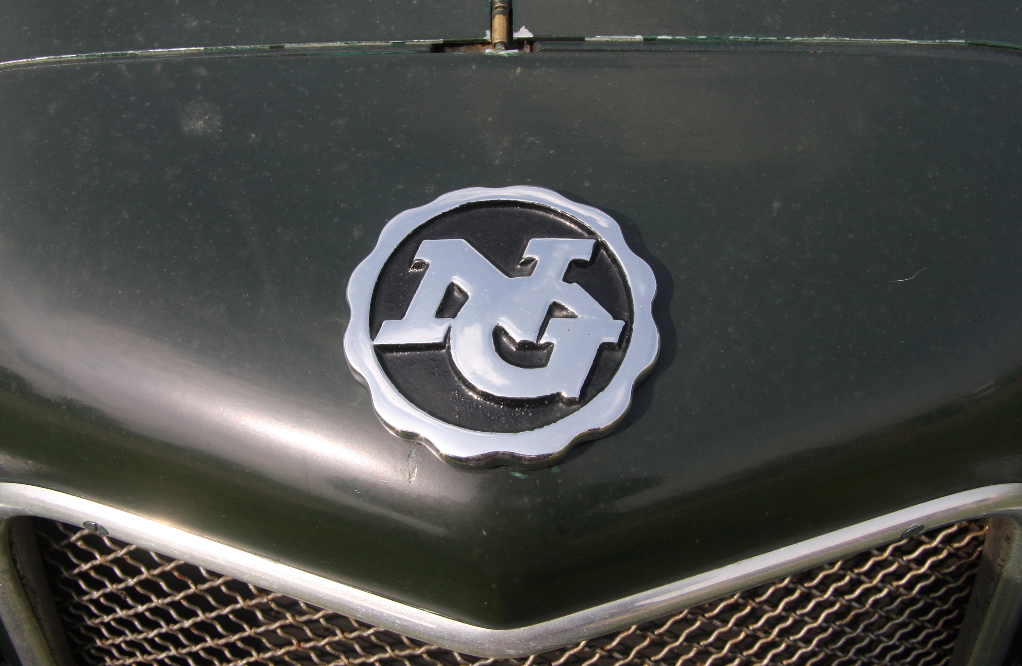 NG Cars logo